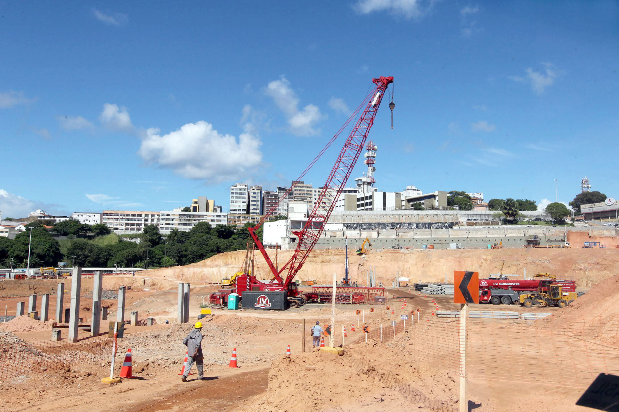 Governador Jaques Wagner e o ministro do Esporte, Orlando Silva, visitam as obras de construção da Arena Fonte Nova. Foto: Manu Dias/AGECOM